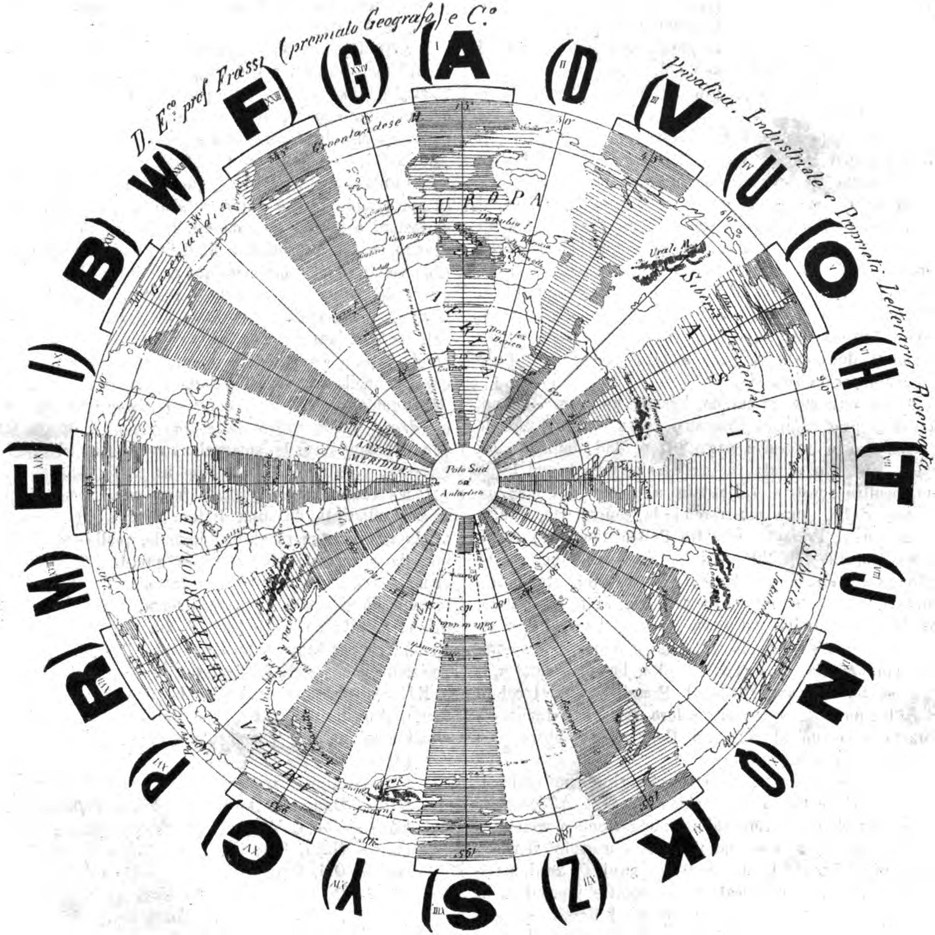 Planisfero orario simbolico di Enrico Frassi